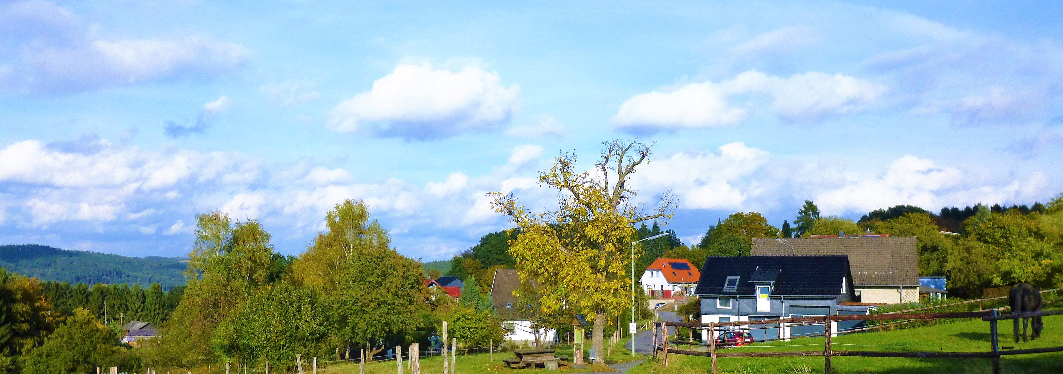 Vordersteimel